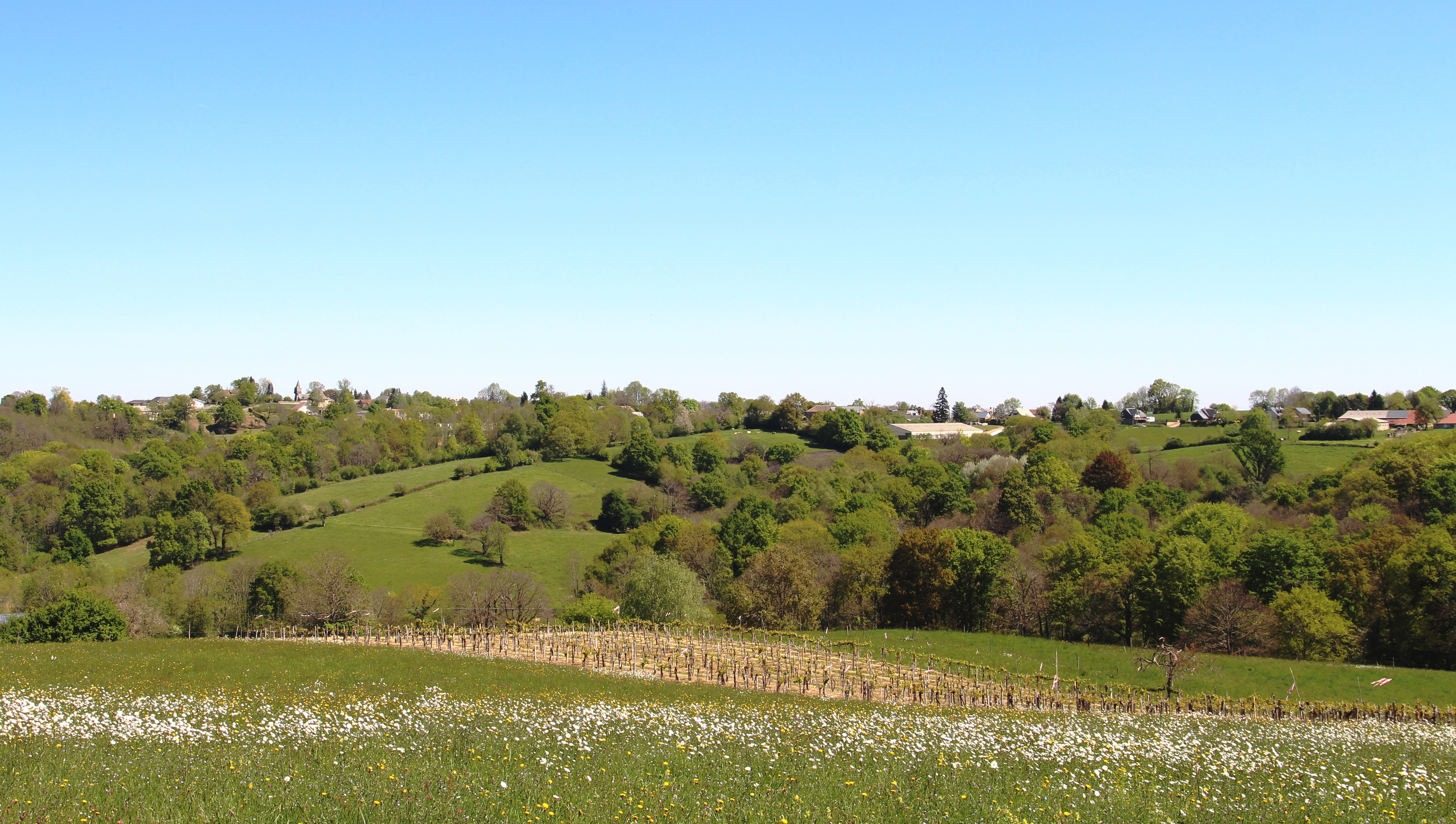 Barbazan-Dessus (Hautes-Pyrénées)